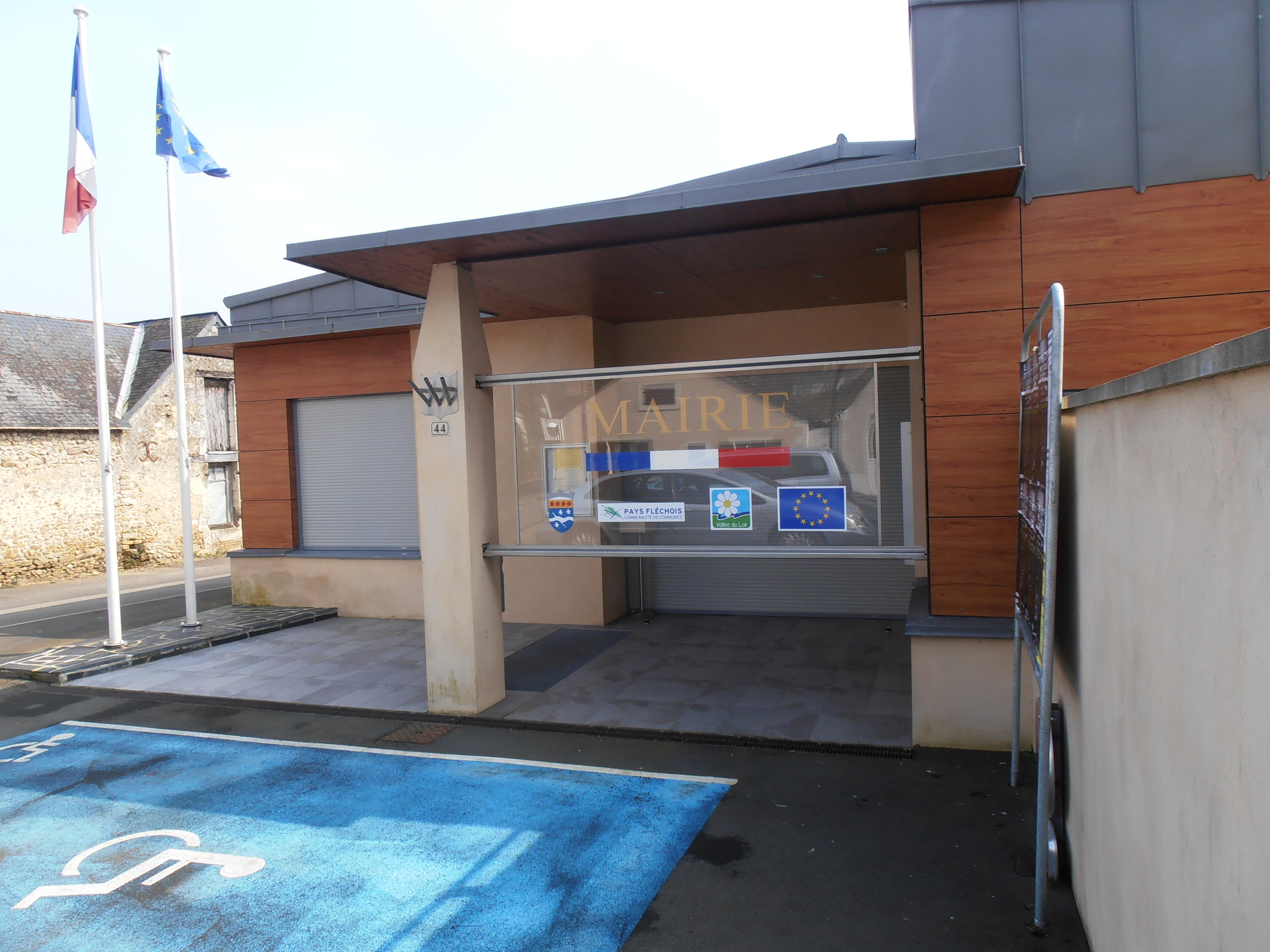 La mairie de Mareil-sur-Loir, Sarthe, France